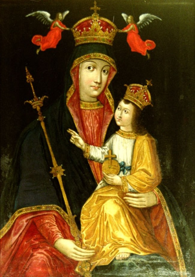 Беларуская (тарашкевіца): Маці Божая Бялыніцкая (Maci Božaja Białynickaja). Абраз з Новай Мышы (Novaja Myš)